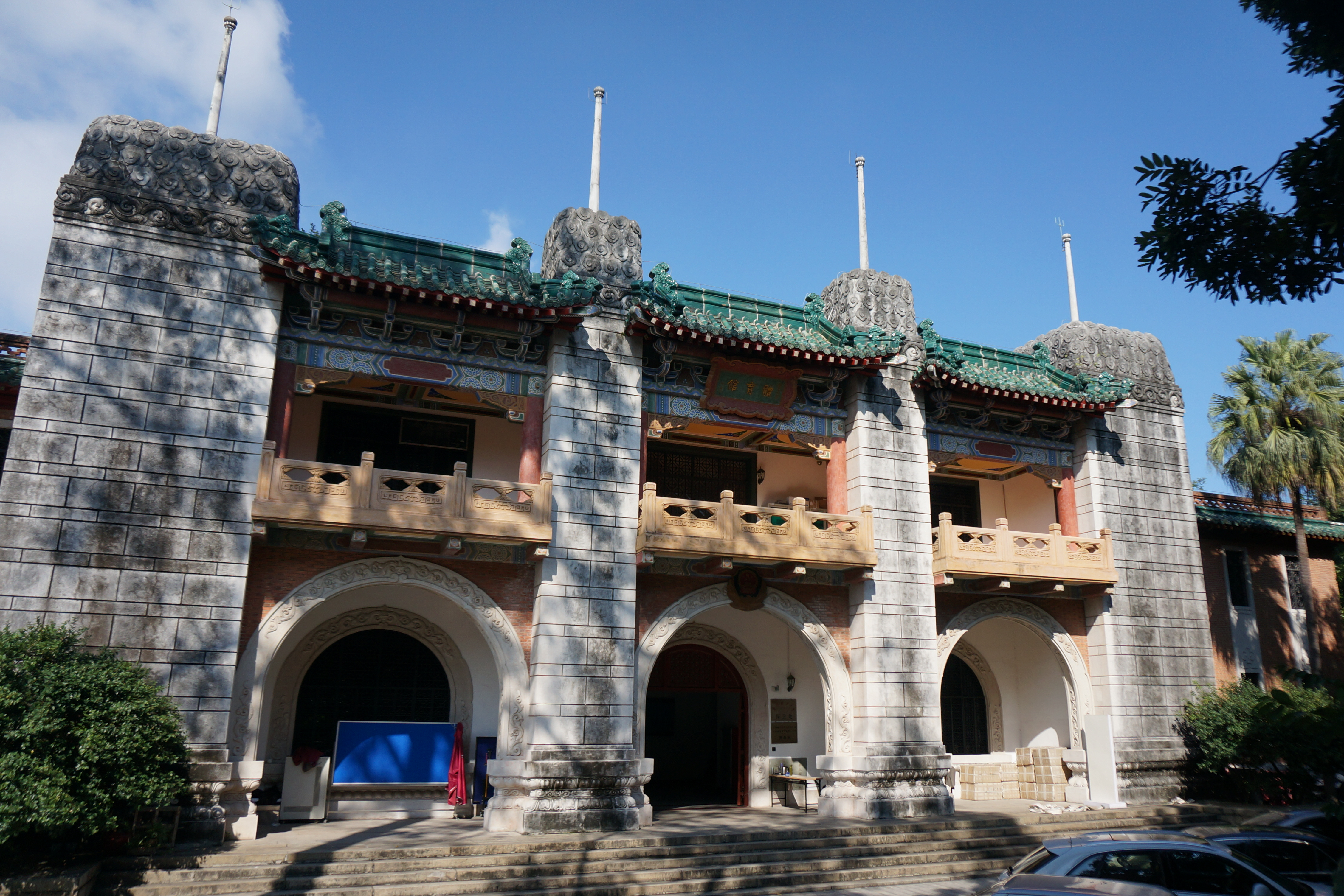 中文（中国大陆）: 原国立中山大学体育馆，今为华南理工大学保卫处办公场所